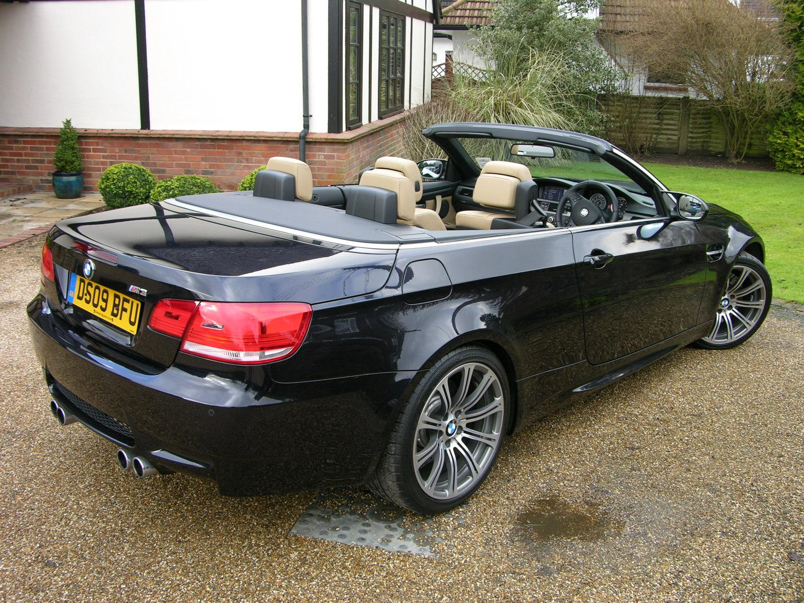 2009 BMW M3 Cabriolet